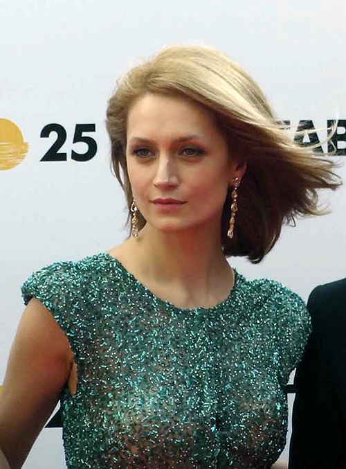 Виктория Исакова на Кинотавре 2014